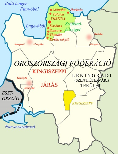 Leningrádi terület részei